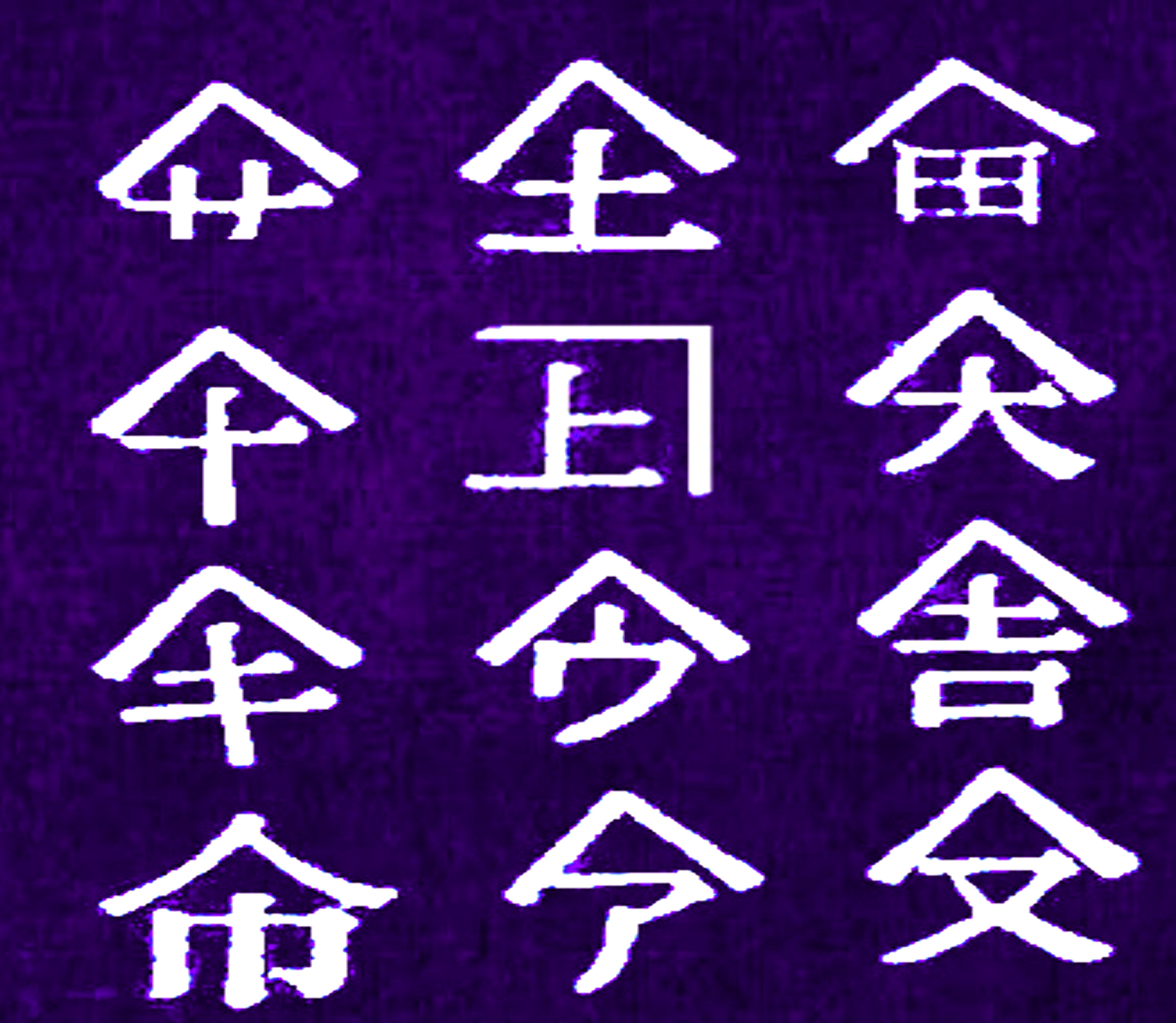 銚子醤油仲間の暖簾